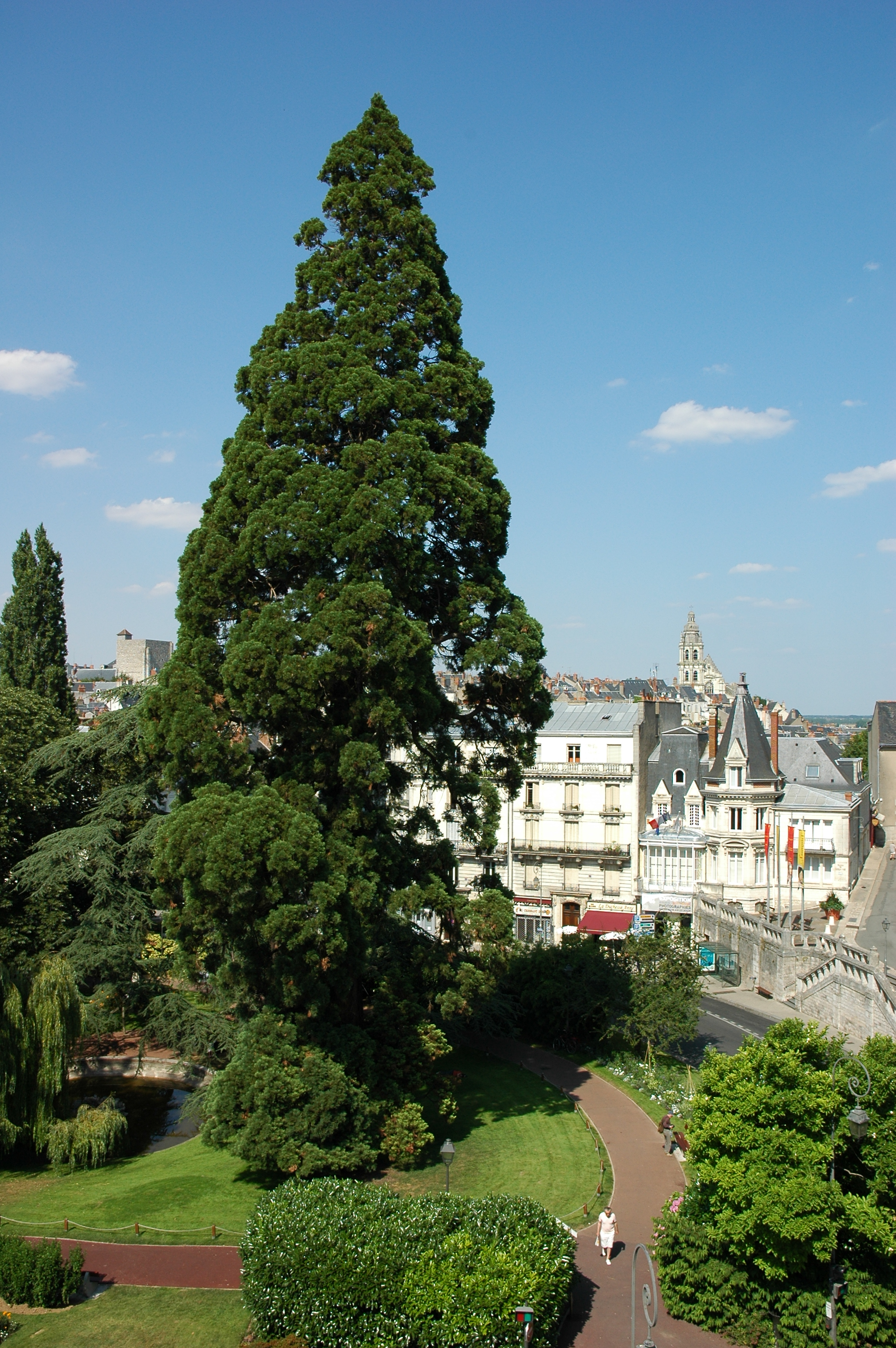 À Blois (Loir-et-Cher, France) : square Victor-Hugo, au pied du château.